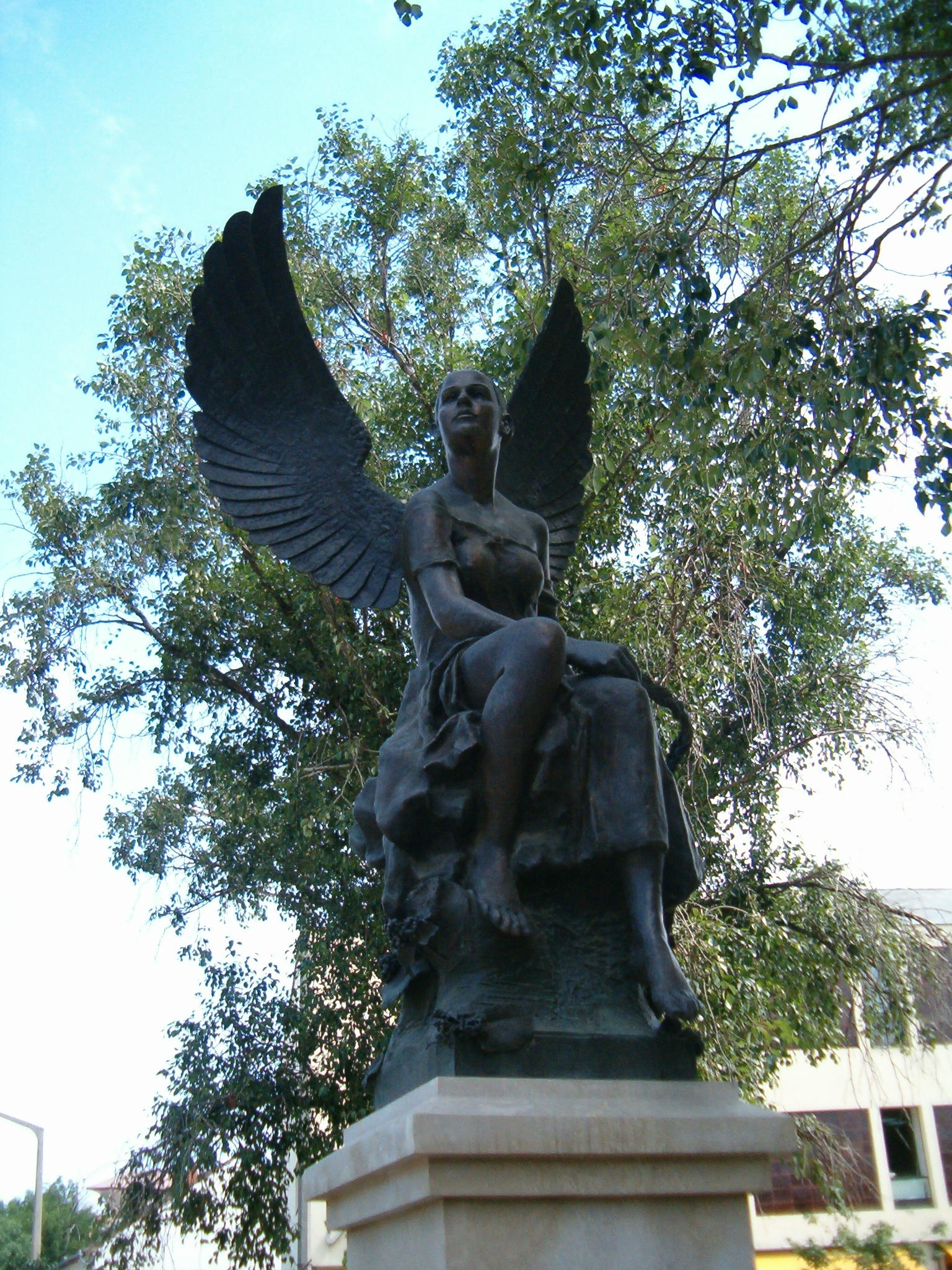 Karcag, Viktória-kút. A győzelem istennőjéről elnevezett, 1893-ban átadott első városi ártézi kutat eredeti állapotába, egykori helyszínére visszaállíttatta Karcag város önkormányzata 2001-ben. Szobrász: Györfi Sándor, kőfaragó: ifj. Györfi Sándor, díszműkovács: Tóth István. - Jász-Nagykun-Szolnok megye, Karcag, Kossuth tér